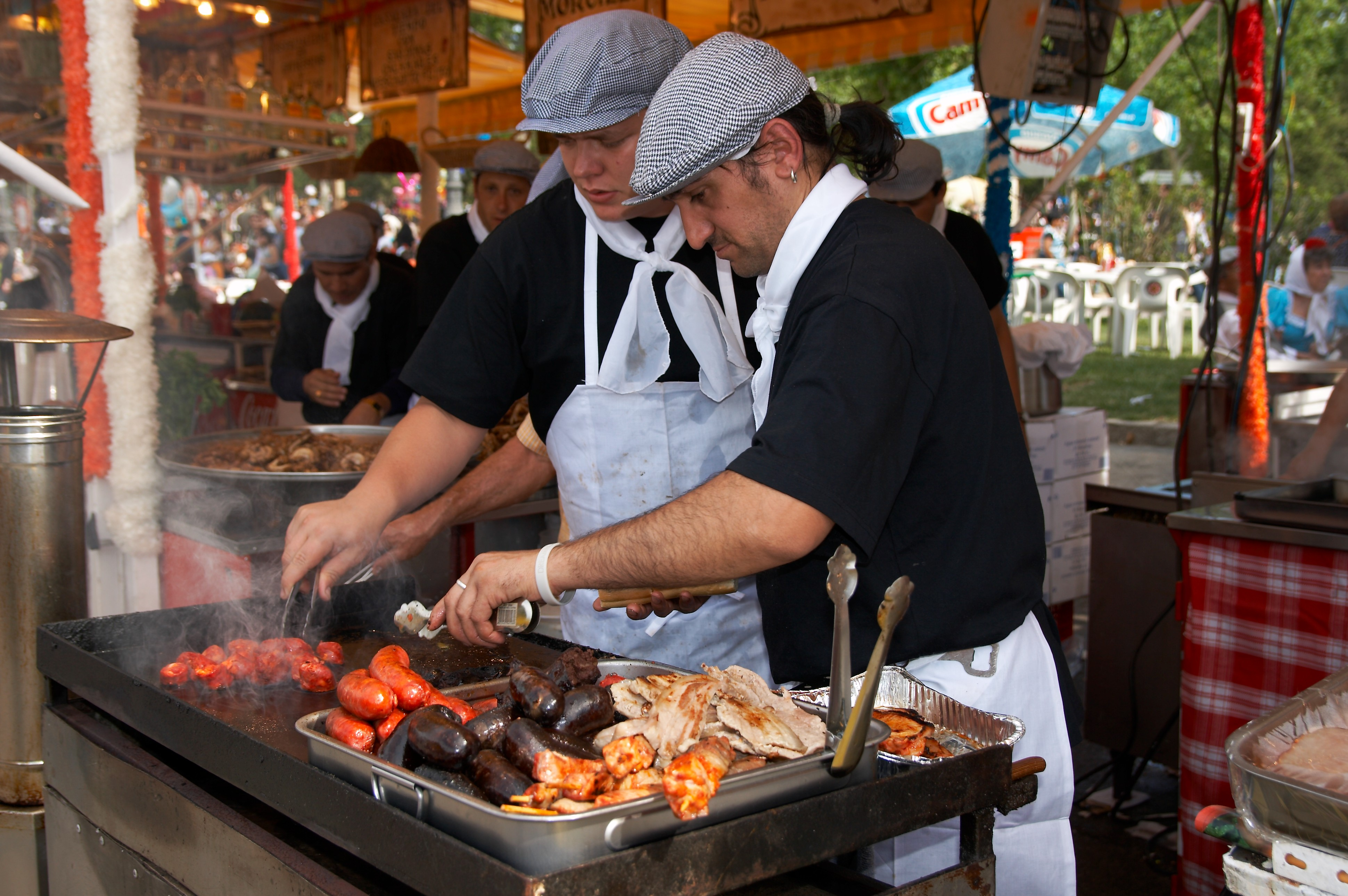 Fiestas de San Isidro 2007, Madrid, España.